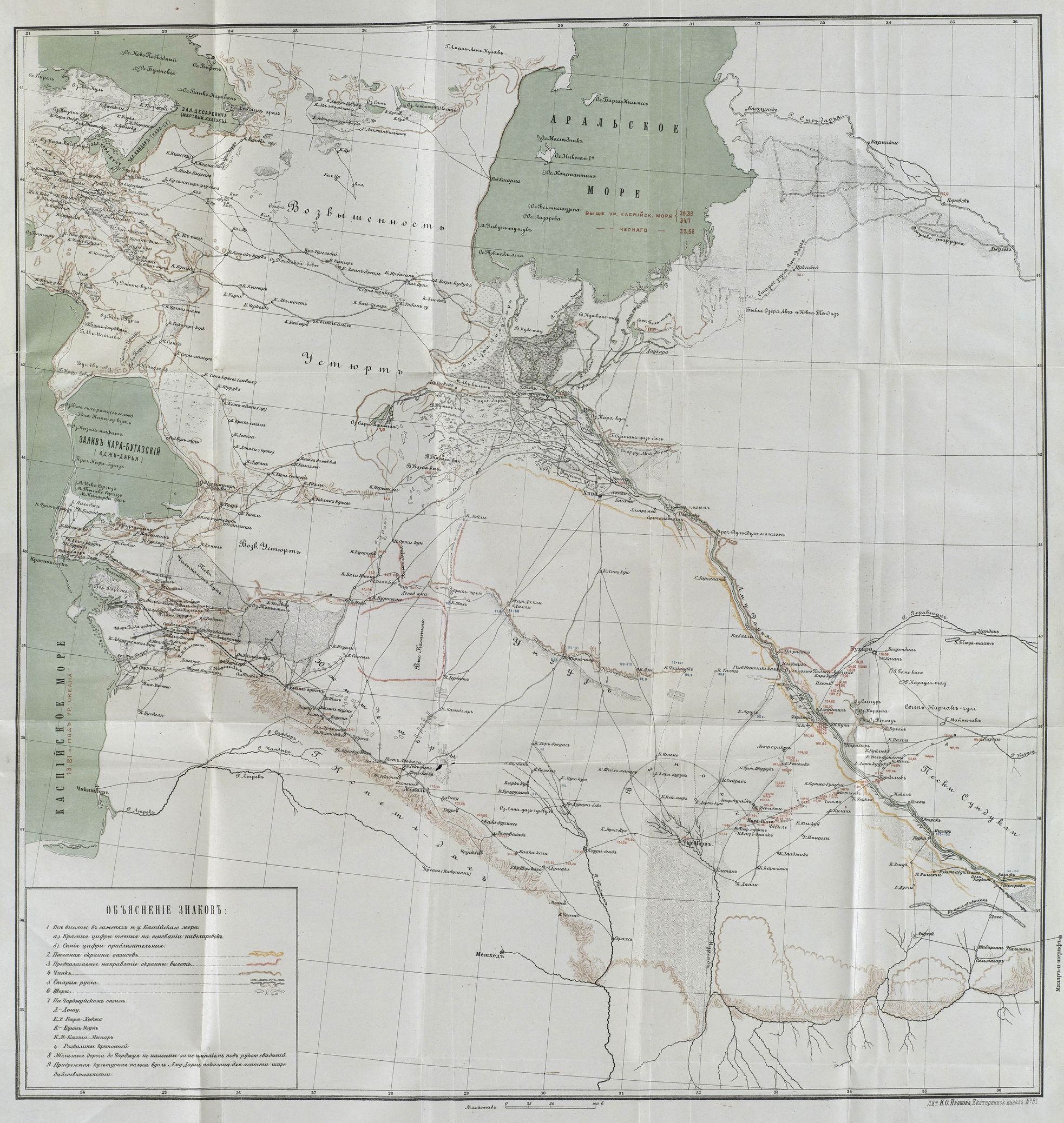 Карта из дореволюционного издания